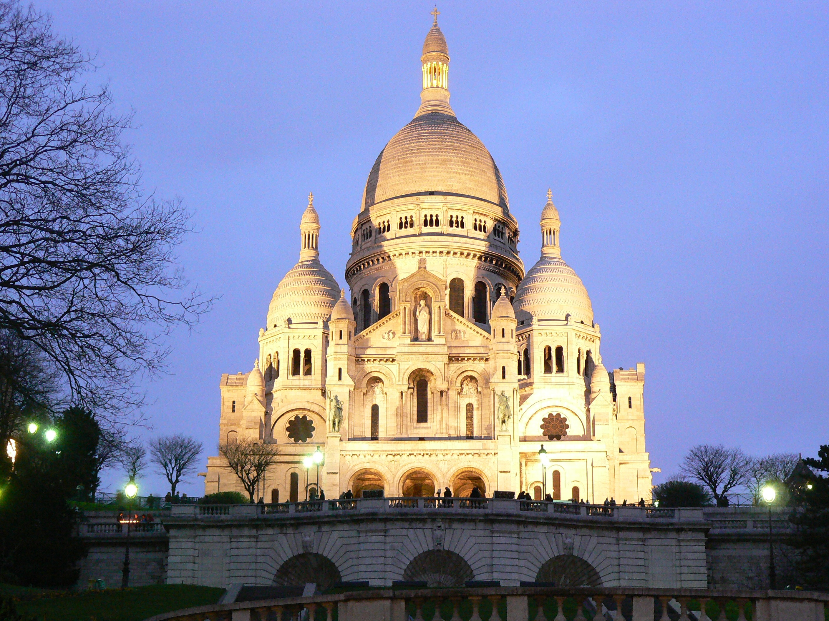 Basilique_du_Sacré-Cœur